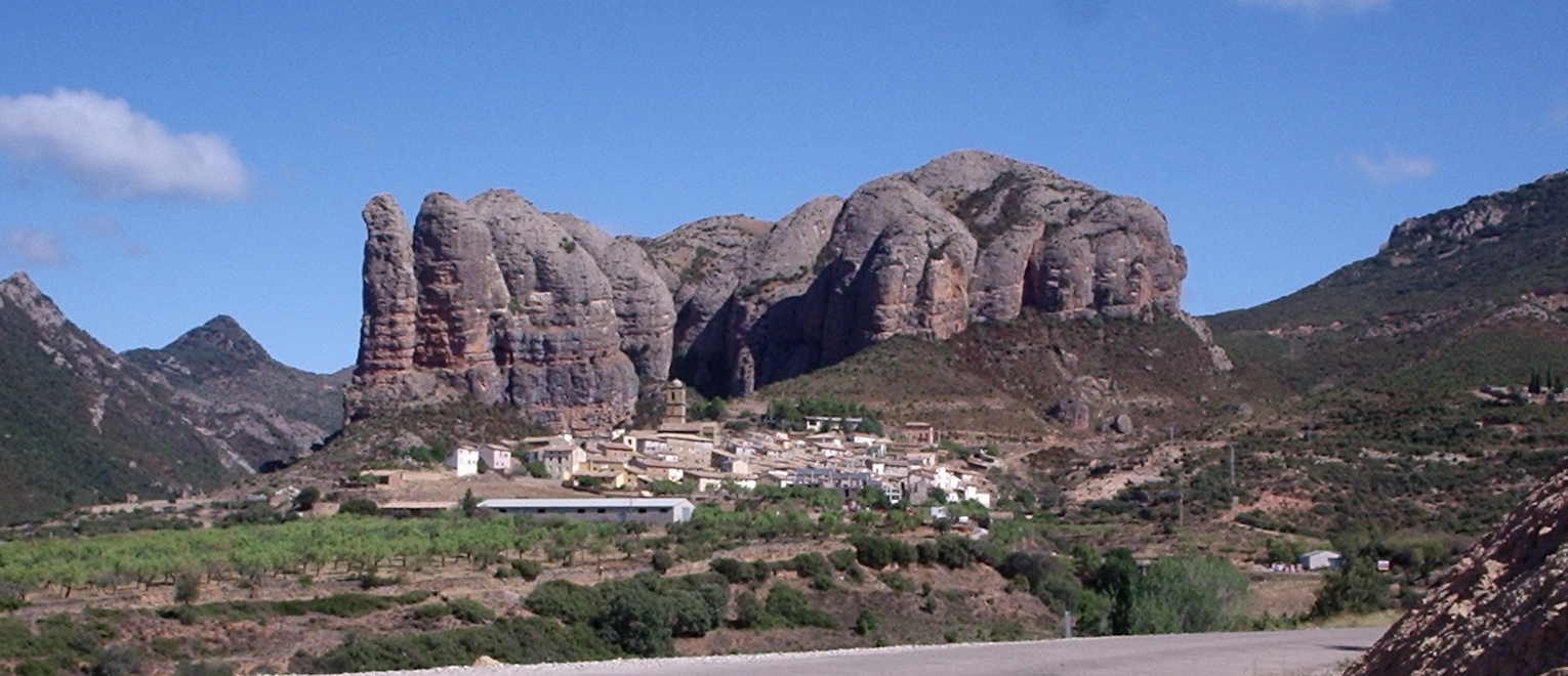 Iglesia de Santiago